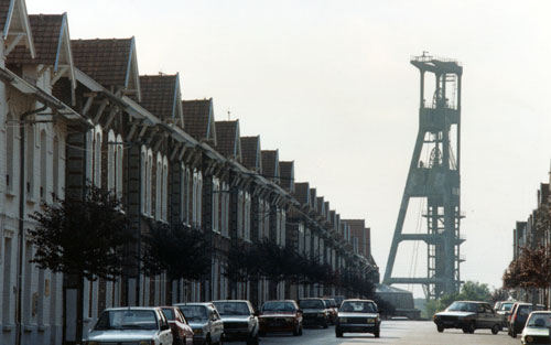 Le chevalet de la fosse n° 6 des Mines de Bruay à Haillicourt